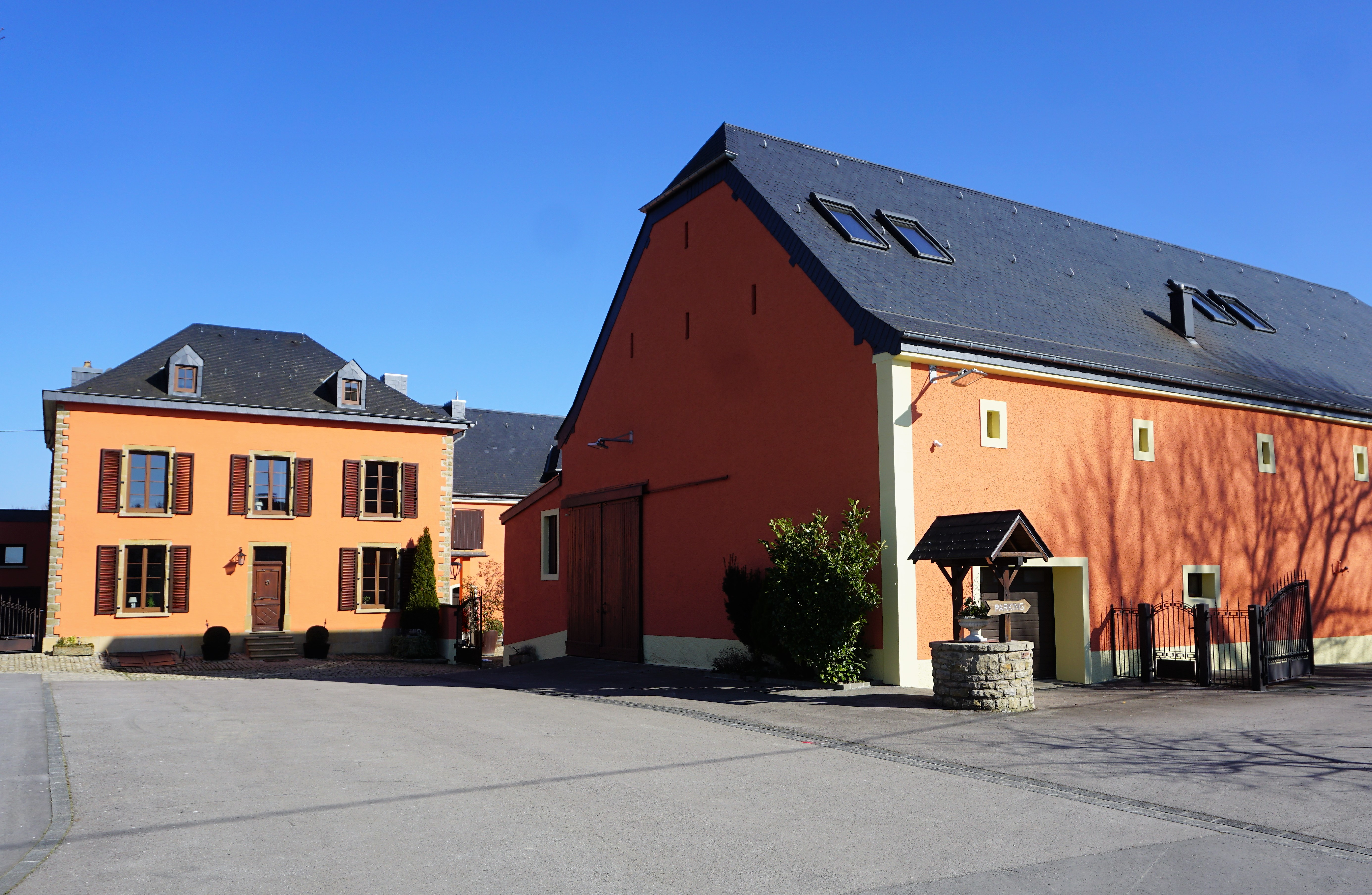 Bertrange, Gréiwelshaff (Ferme de Grevels).